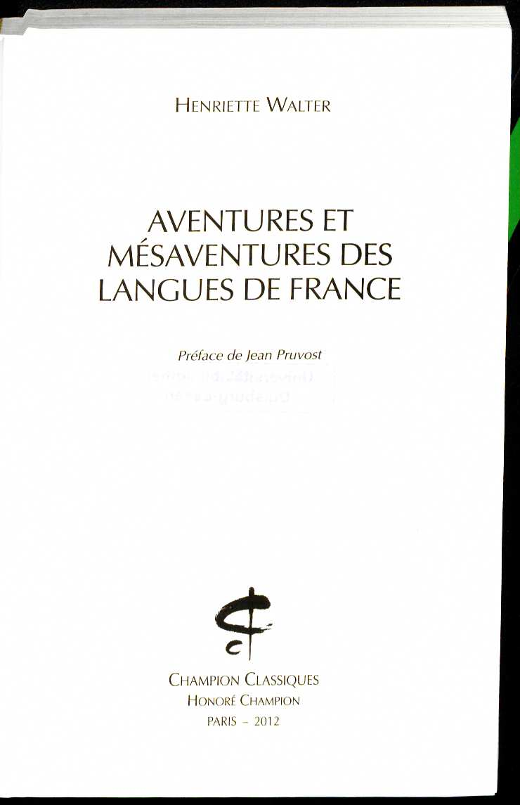 Henriette Walter Aventures et Mésaventures des langues de France. Vorwort Jean Pruvost. Paris : Éditions du Temps, 2012 Titel